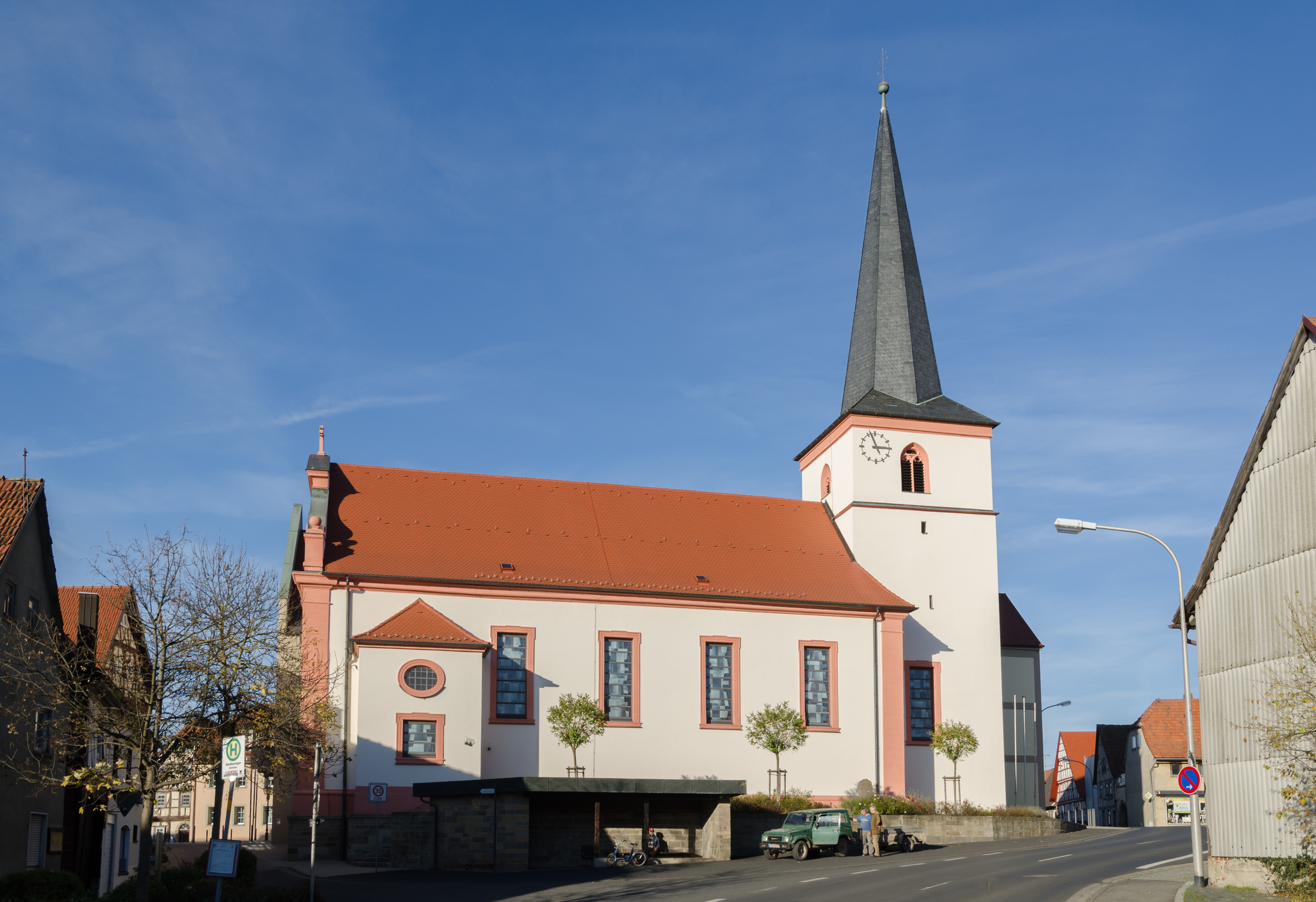 Kath. Pfarrkirche St. Johannes der Täufer in Stadtlauringen